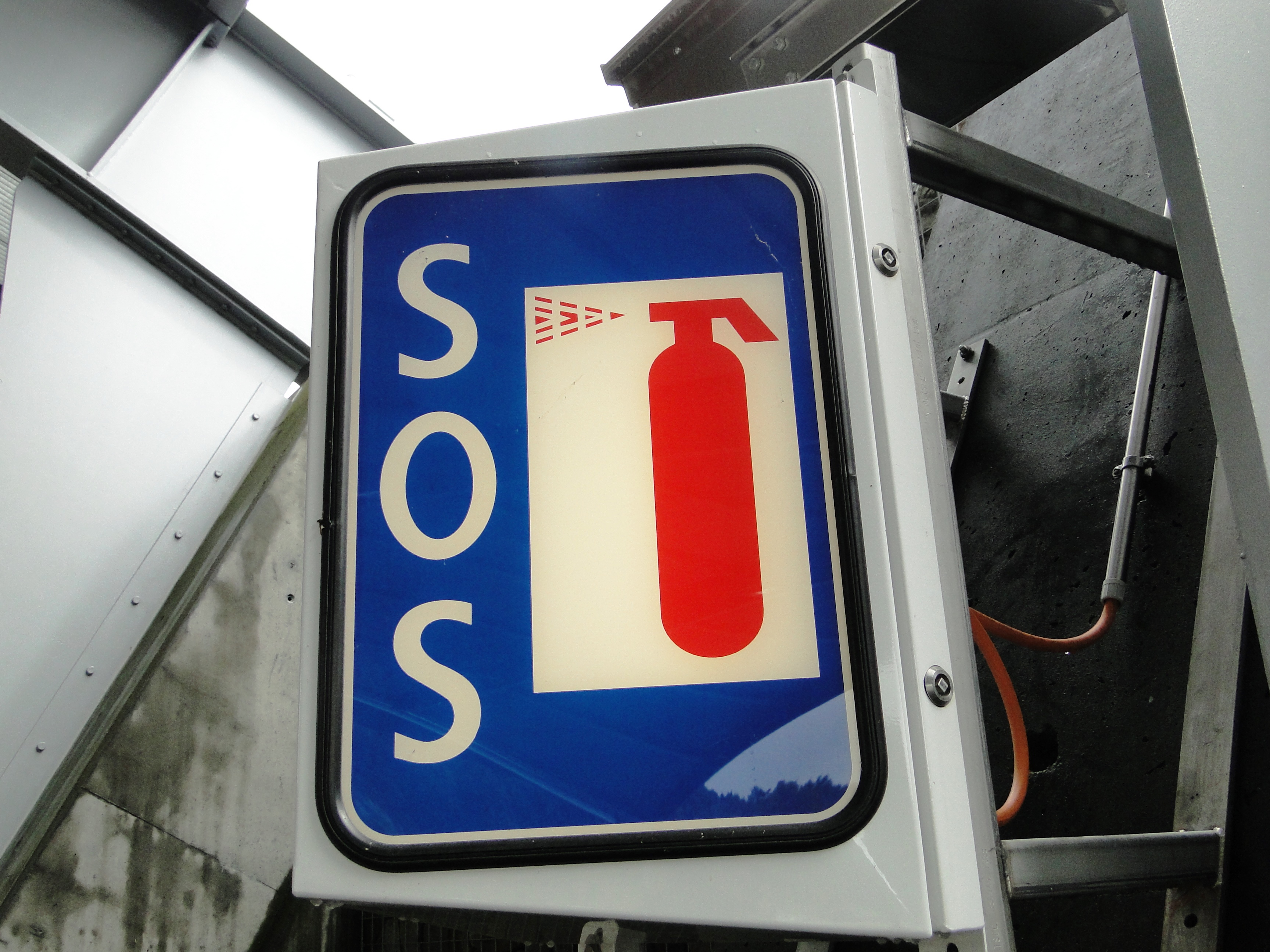 Verkéiersschëld E,30a aus dem Lëtzebuerger Code de la route